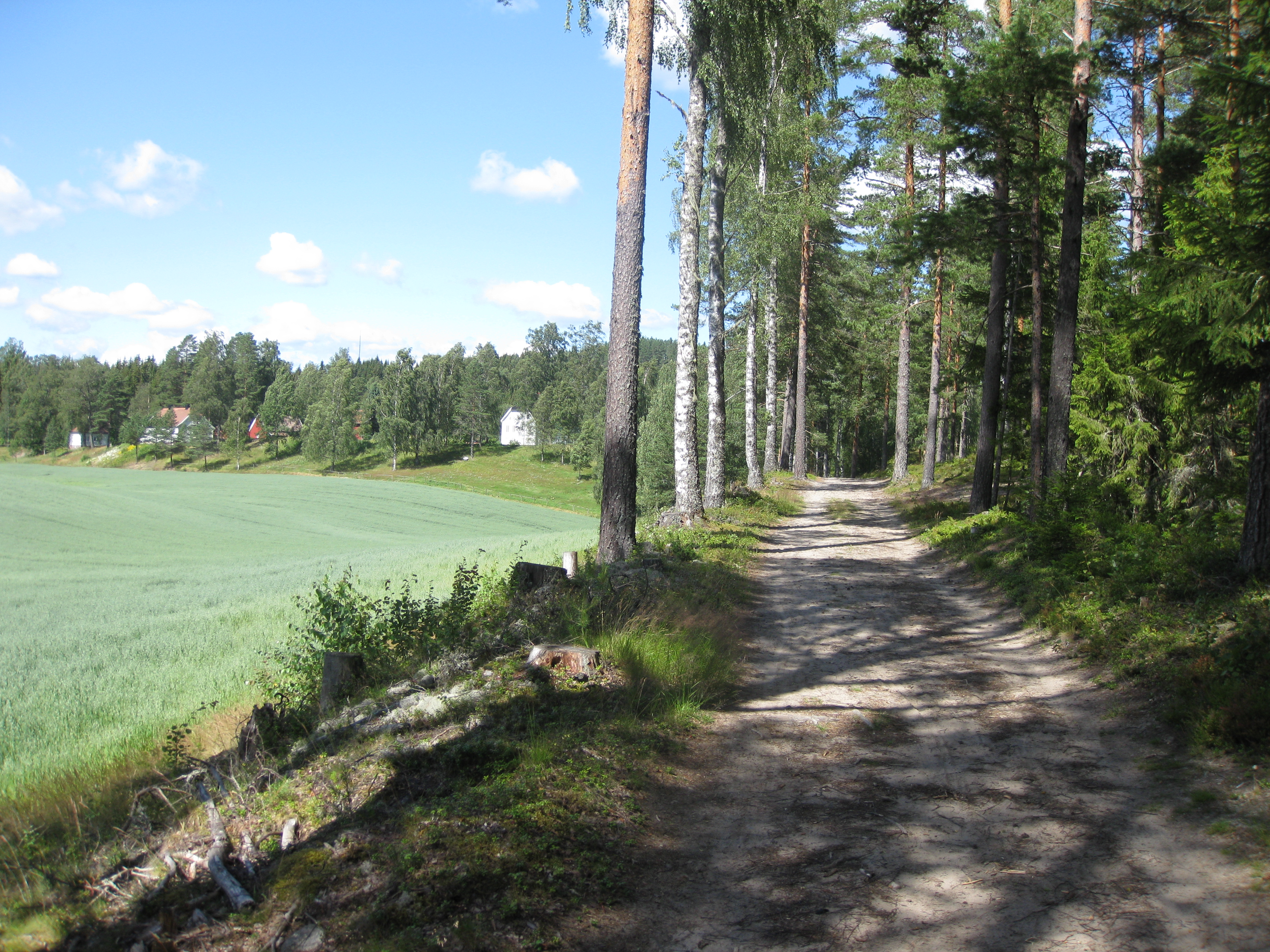 Bilde tatt på Vingerske kongevei ved Lier gård, slagsted i 1808 og 1814. Lier gård/skanse ble i begge tilfeller angrepet av svenske styrker og forsvart av norske. Bildet er tatt i retning mot Kongsvinger, altså fra svensk side mot de norske stillingene. En forskutt skanse er akkurat i høyre bildekant.